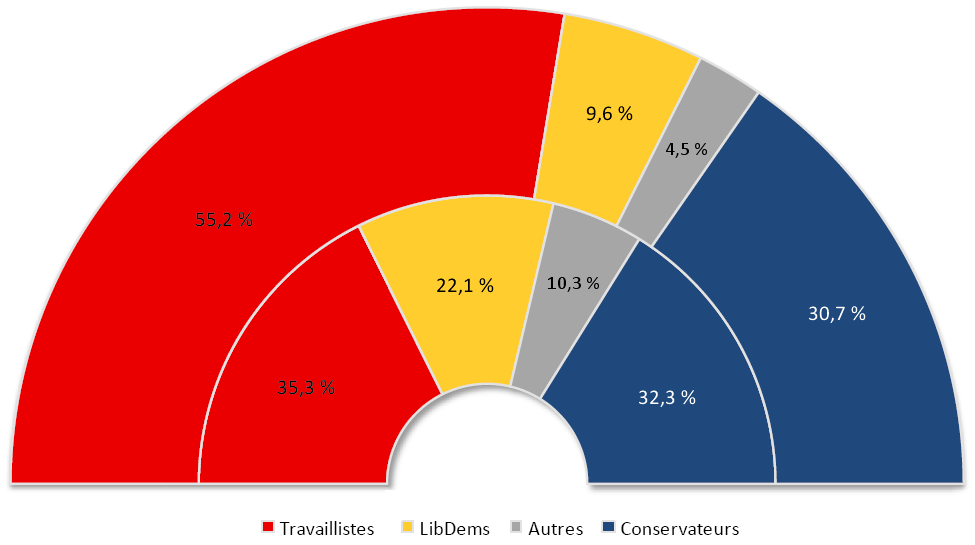 Graphique comparant la part des voix à la part des sièges obtenus par les différents partis lors des élections générales britanniques de 2005.